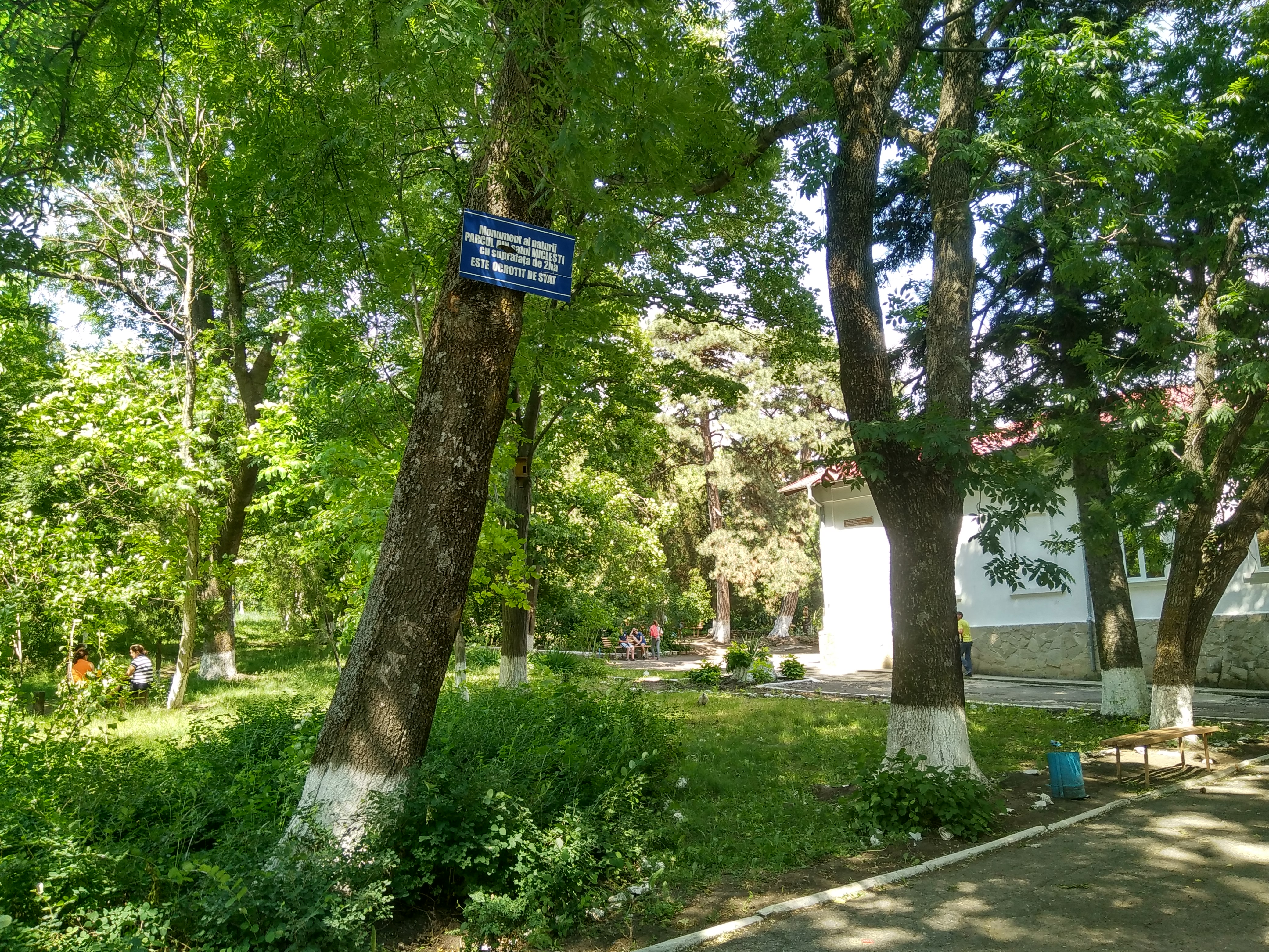 Parcul din satul Miclești, monument al naturii amplasat în raionul Criuleni, satul Miclești (cod MD-CR-map-008)